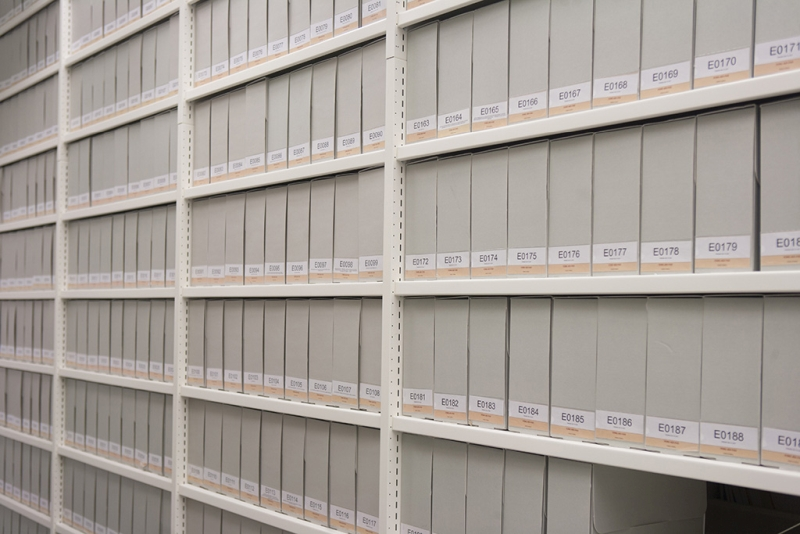 Arxius al Centre de Documentació del Museu del Disseny de Barcelona